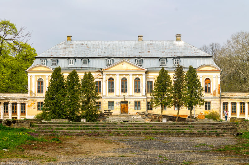 Свяцкі палац.